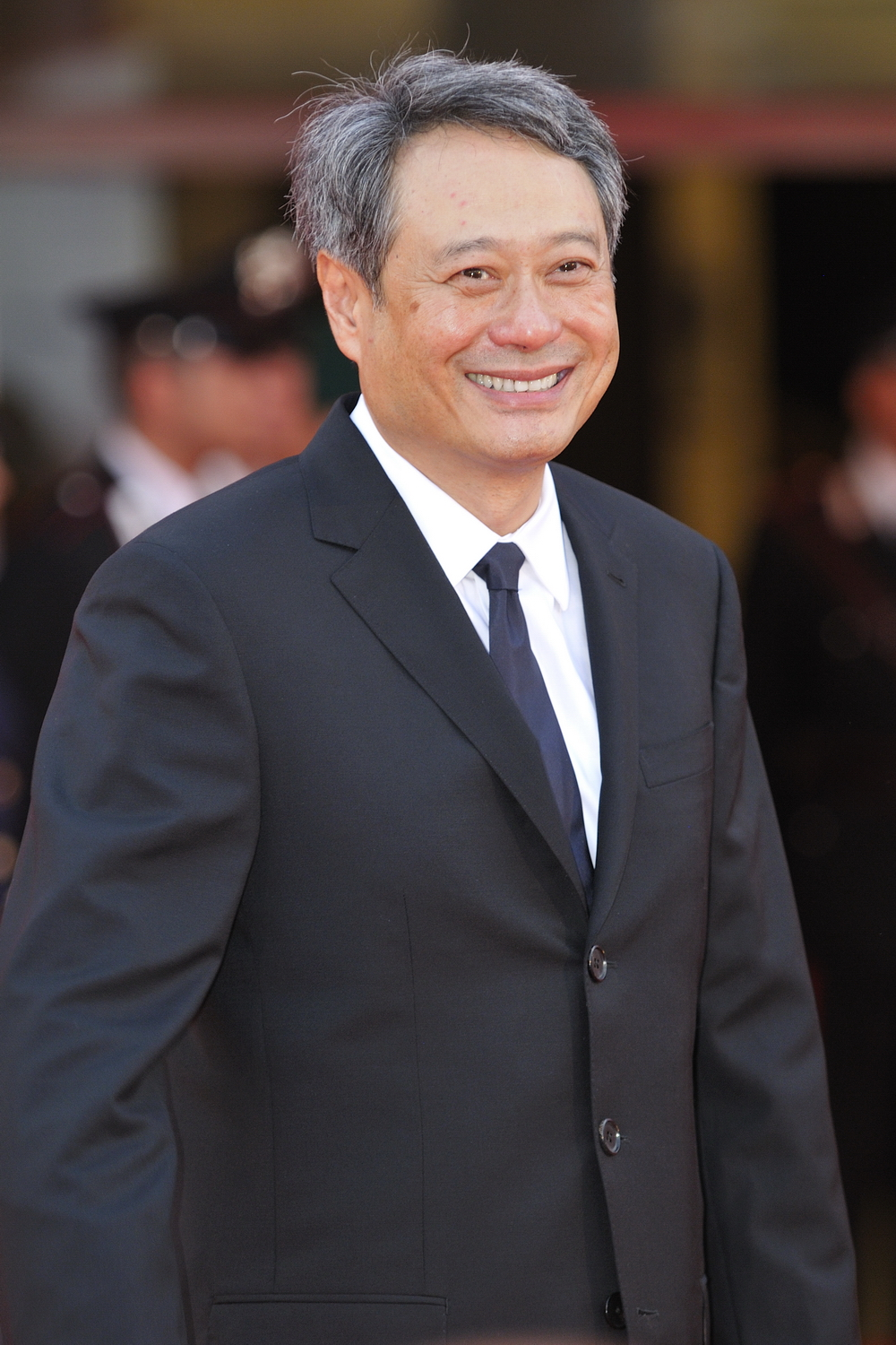 66ème Festival du Cinéma de Venise (Mostra) Ang Lee Soirée d'ouverture, tapis rouge, avec les premières célébrités arrivées à Venise.